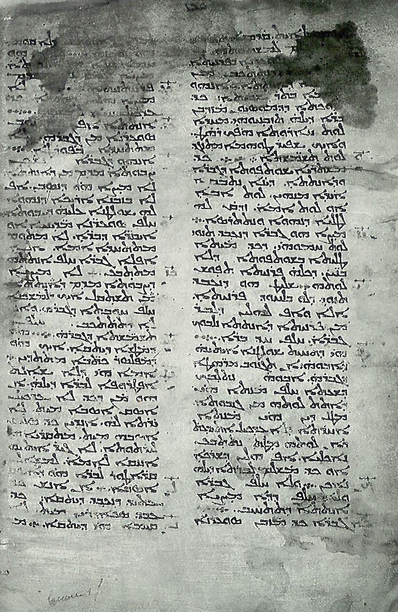 Handschrift auf Pergament in syrischer Sprache Vat.Syr. 560, Blatt 27 verso (Rückseite): Text der Sententiae Syriacae mit den Punkten (ca.) 15 bis 30